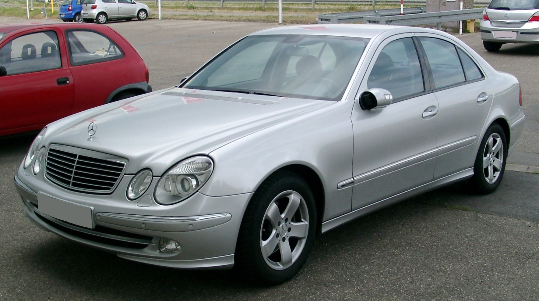 Mercedes-Benz W211